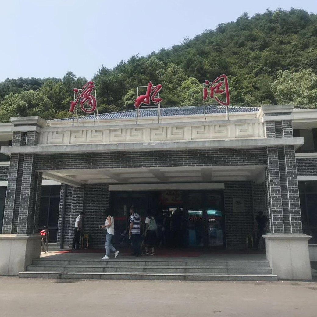 中文（中国大陆）: 滴水洞